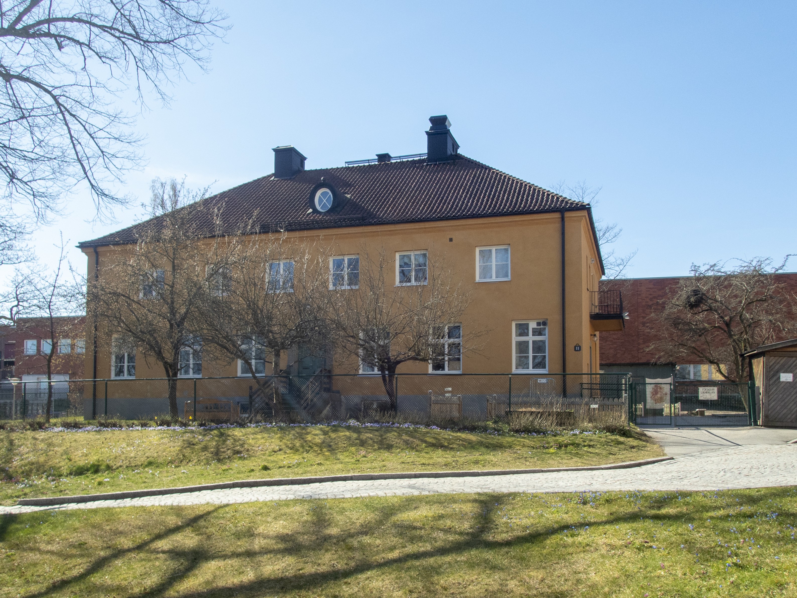 Den tidigare Överläkarvillan vid Allmänna BB: Byggnadsår 1921, efter donation av Herman Asch. Arkitekt: Ernst Stenhammar